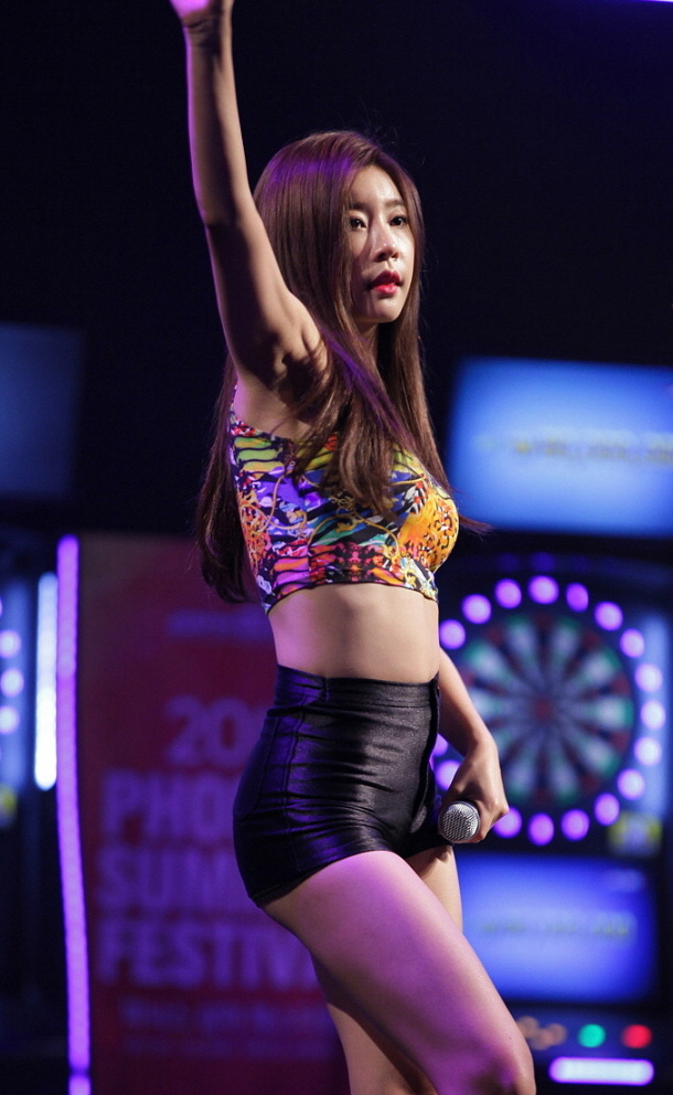 걸스데이(Girl's Day) 2015 피닉스 섬머 페스티벌 일산 킨텍스